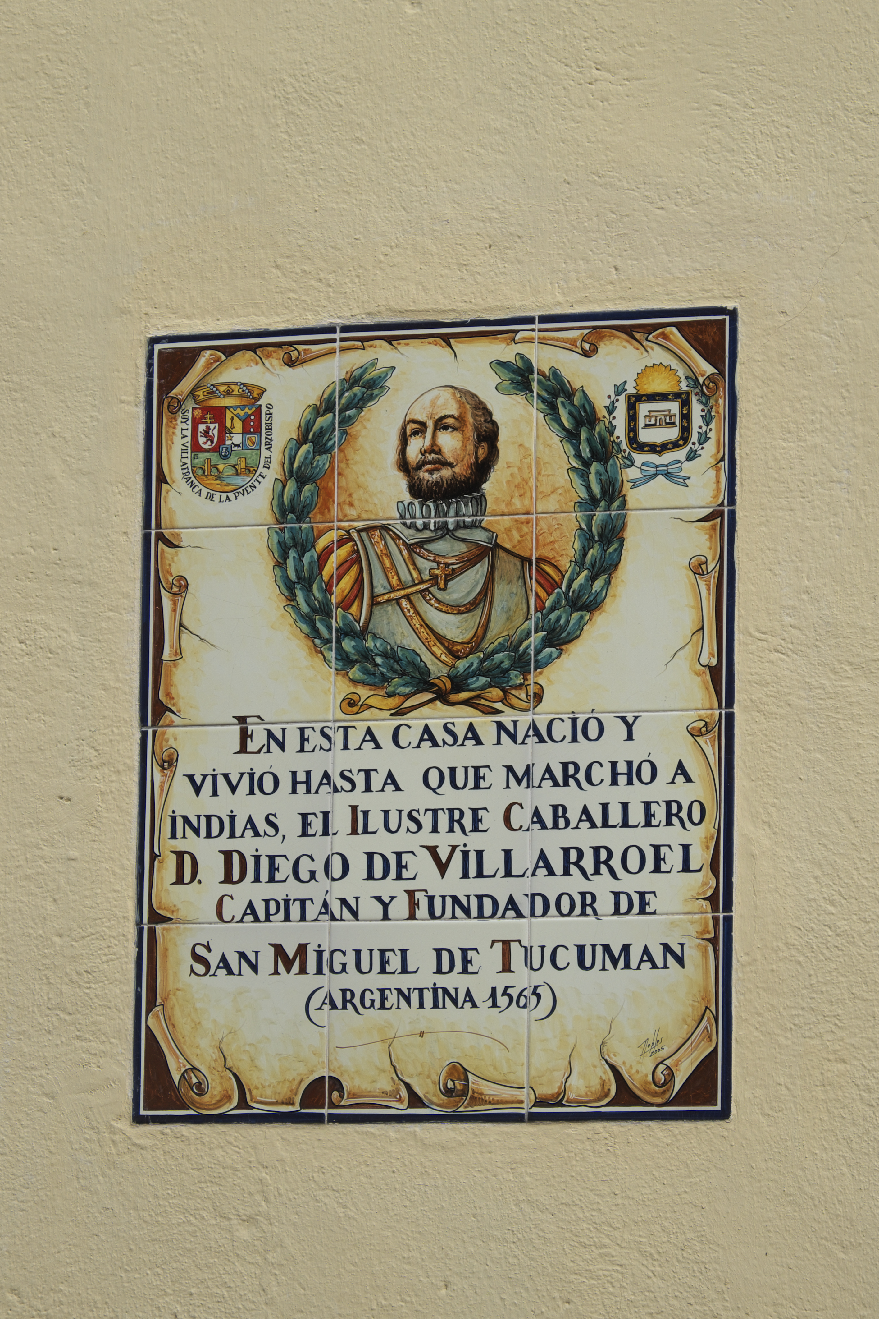 El Puente del Arzobispo in der Provinz Toledo (Kastilien-La Mancha/Spanien), Keramikfliesen an einer Hauswand, Darstellung: Diego de Villarroel